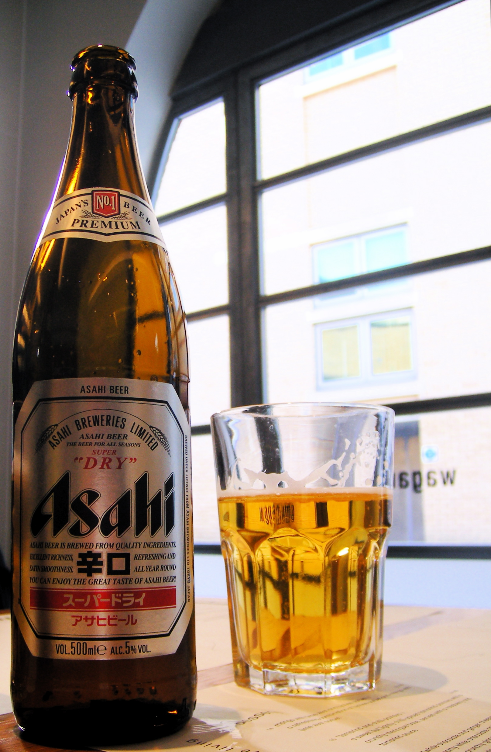 Asahi Super Dry (lager beer)